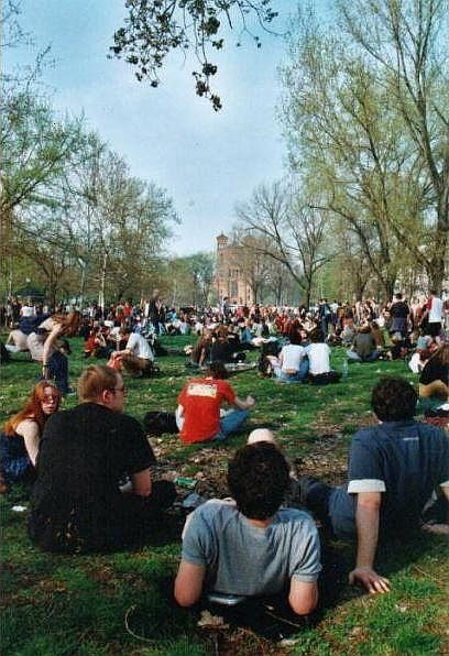 Das Bild entstand am 1. Mai 2001 in Berlin-Kreuzberg auf dem Mariannenplatz. Hinten im Bild ist die St.-Thomas-Kirche. Zu dem Zeitpunkt war auf dem Platz noch das traditionelle 1.-Mail-Familienfest, später gab es an dieser Stelle Randale.